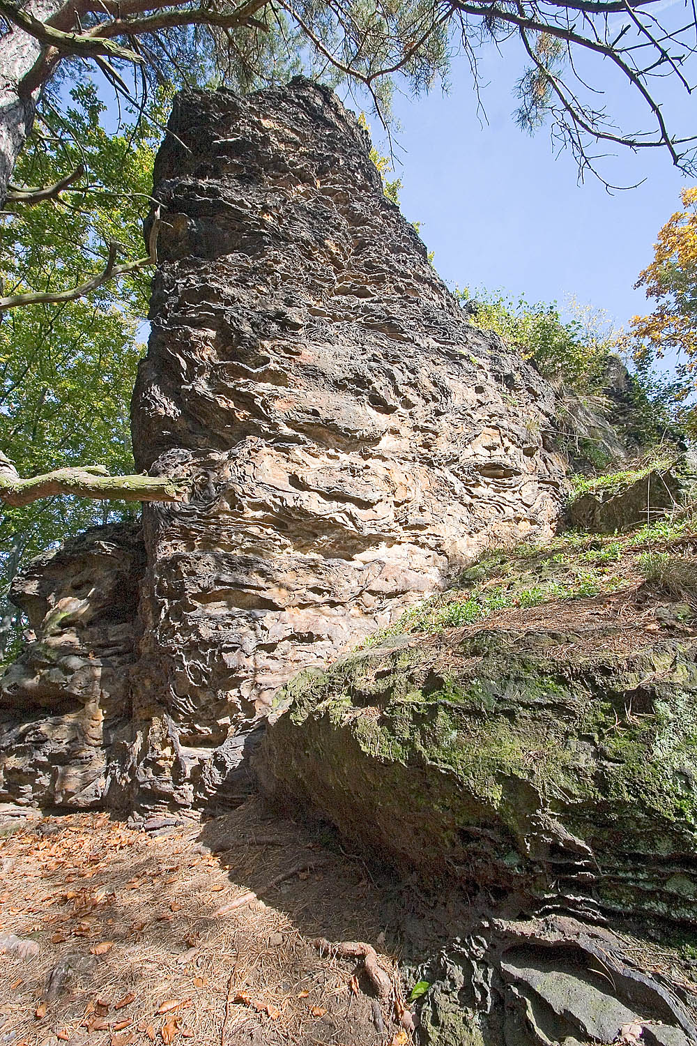 Přírodní památka Střezivojický Špičák